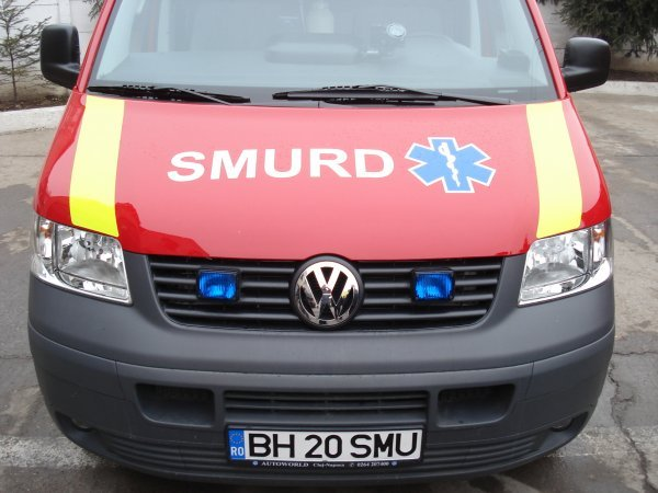 ambulanza SMURD.